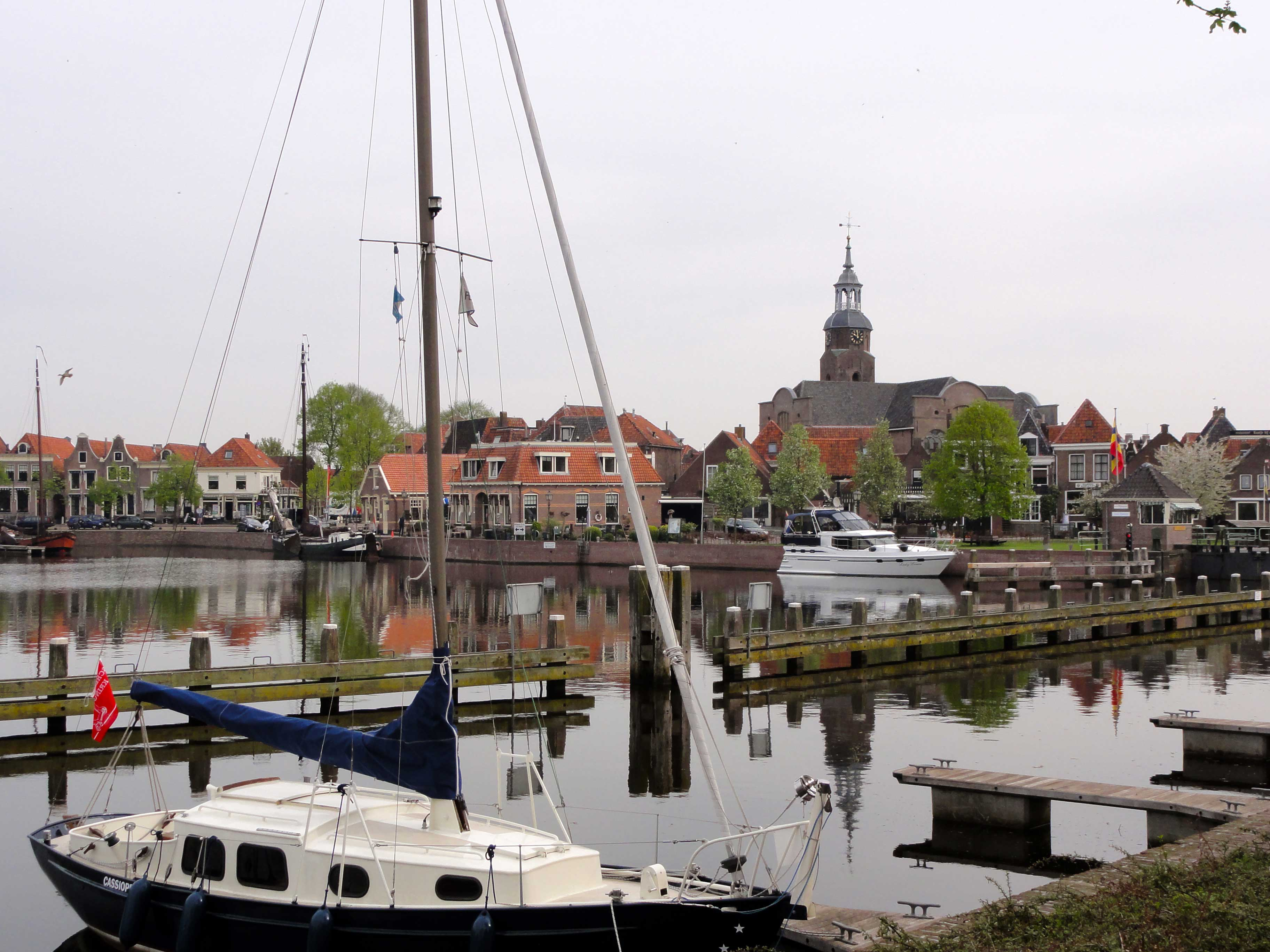 Blokzijl Havenkolk (rijksmonument)